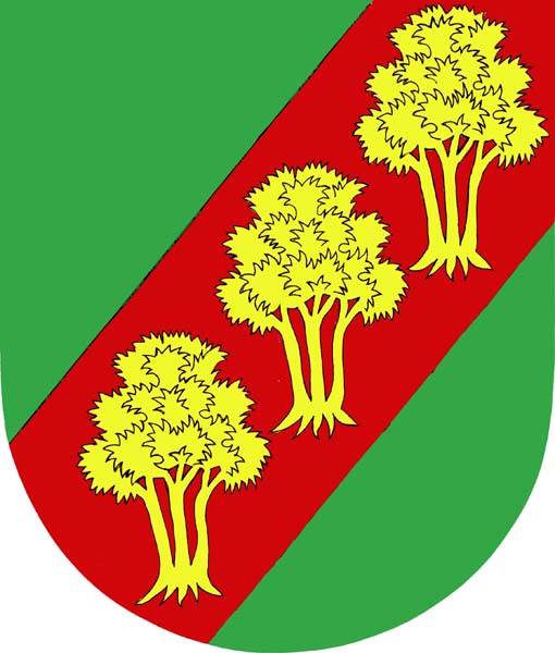 Znak obce Brumov